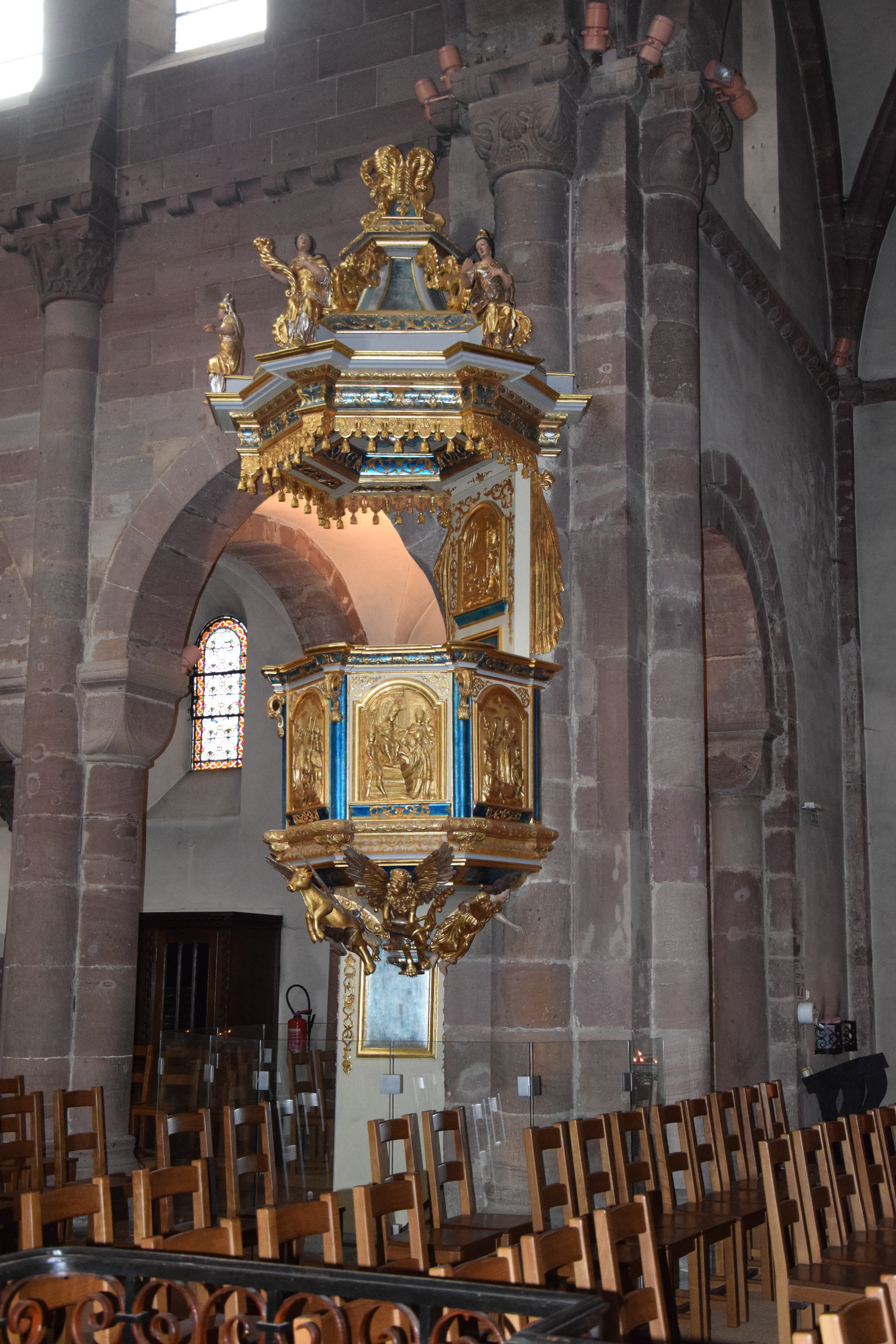 Interior of Église Sainte-Foy de Sélestat